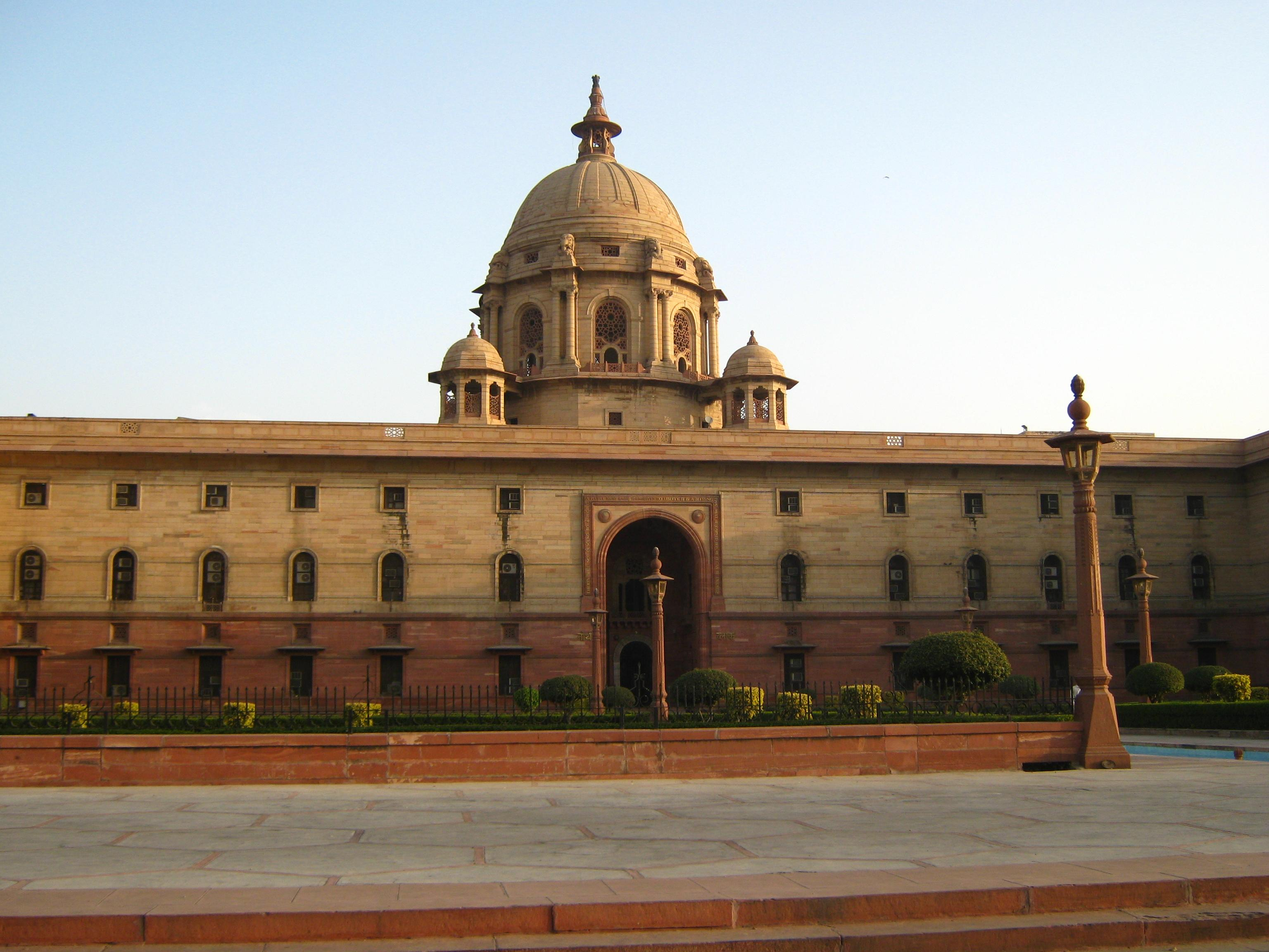 केन्द्रीय सचिवालय का दक्षिणी खण्ड